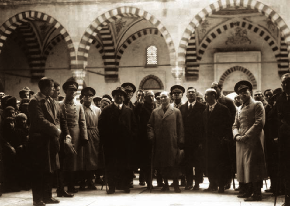 Selimiye Camii, Edirne, 25 Aralık 1930